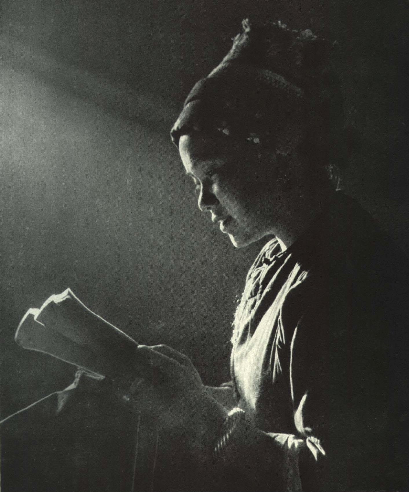 1963-07 1963年 白族姑娘